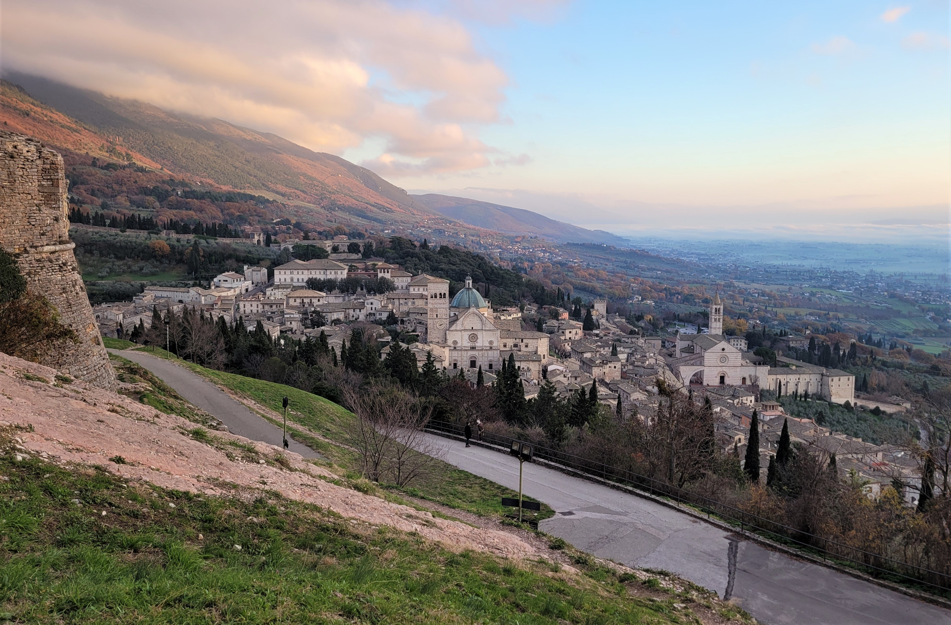 Assisi (Italy) - La Basilica Superiore